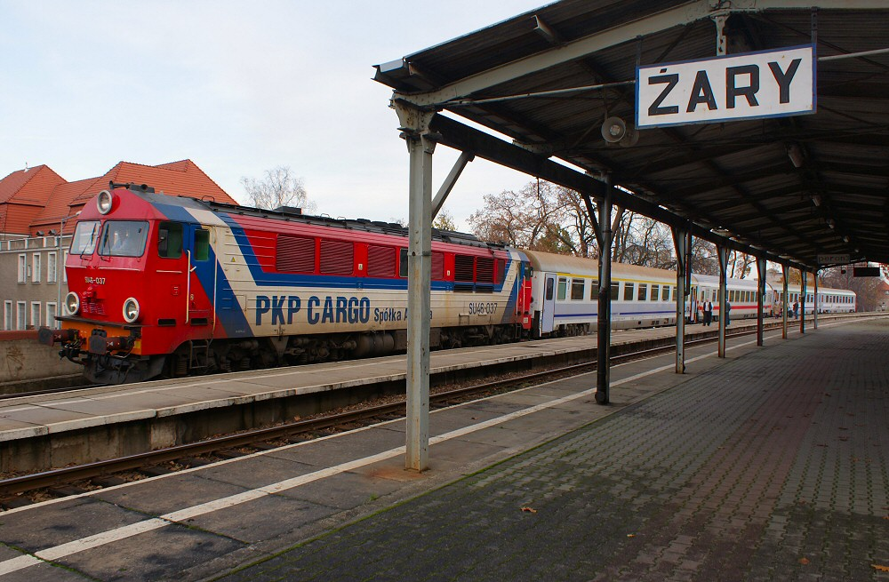 Pociąg EC Wawel z Krakowa do Hamburga na stacji Żary